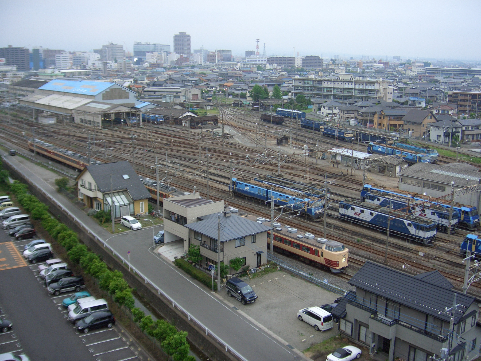 JR貨物・高崎機関区構内